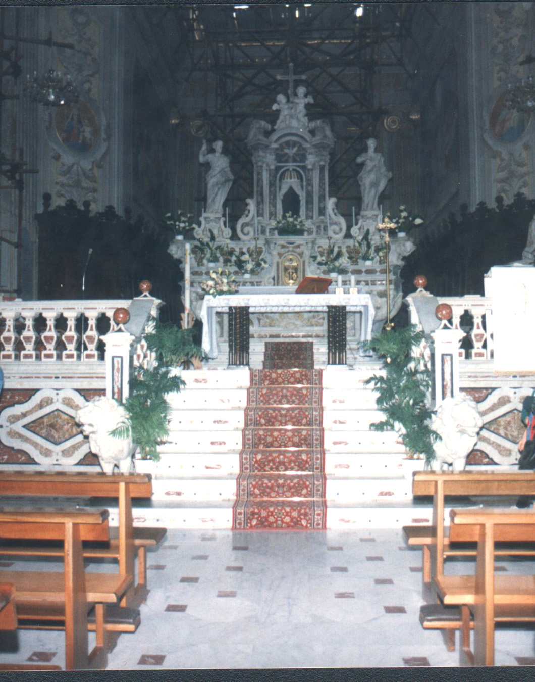 Altare Maggiore della Cattedrale di Ales